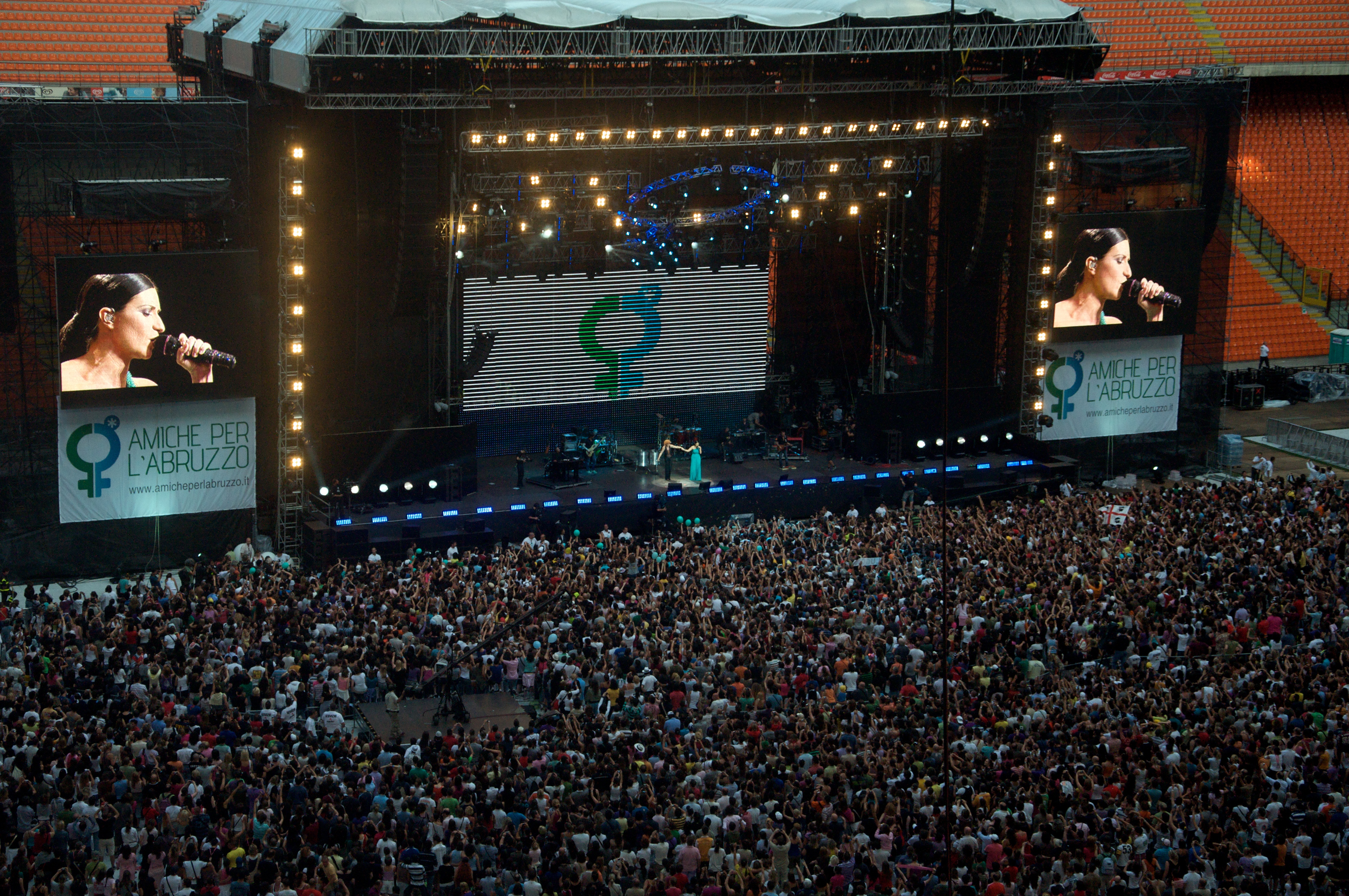 Fiorella Mannoia, Laura Pausini, Amiche per l'Abruzzo, Stadio Giuseppe Meazza di San Siro a Milano, 21-06-2009